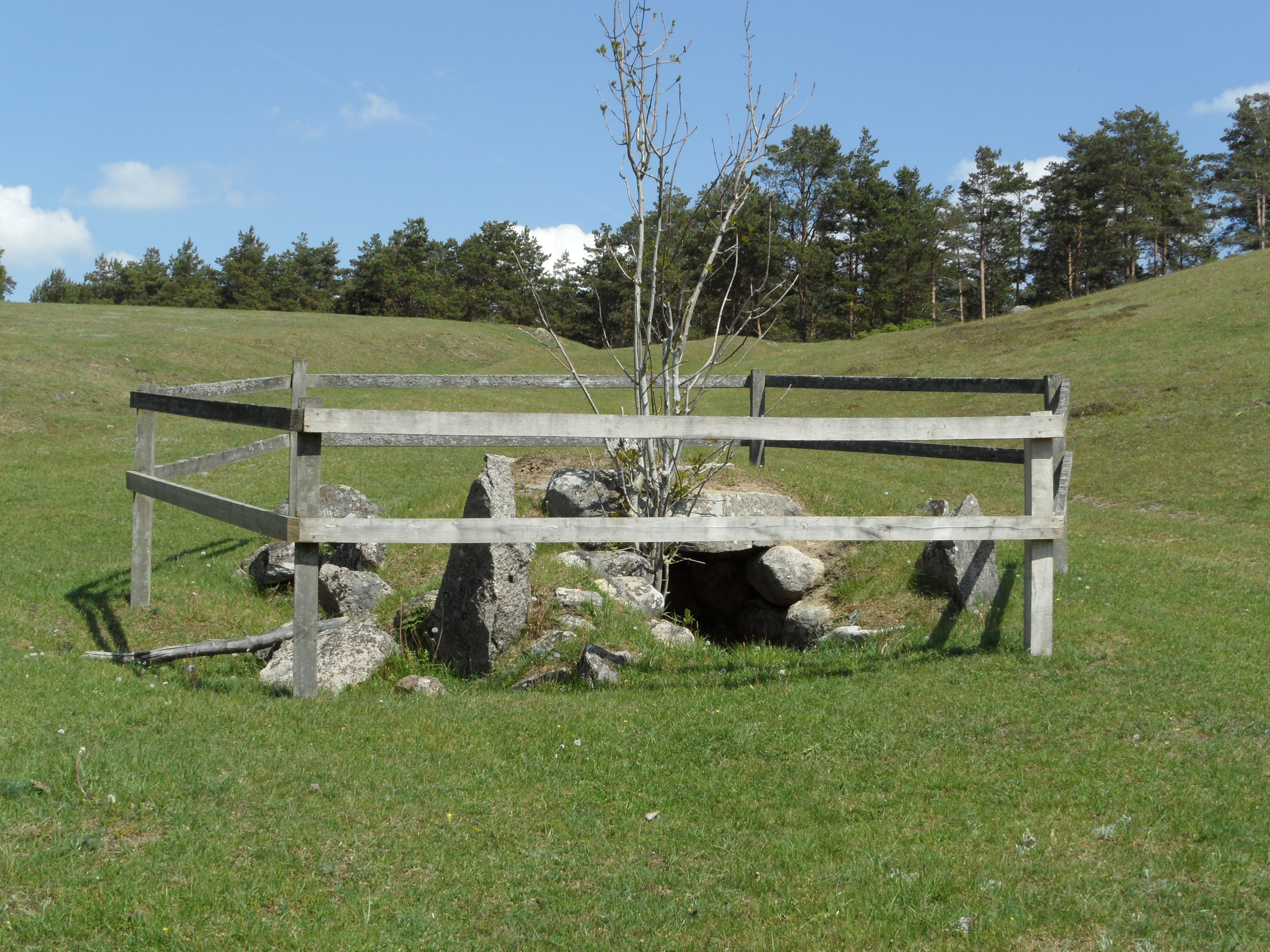 Kumlan jordkällare